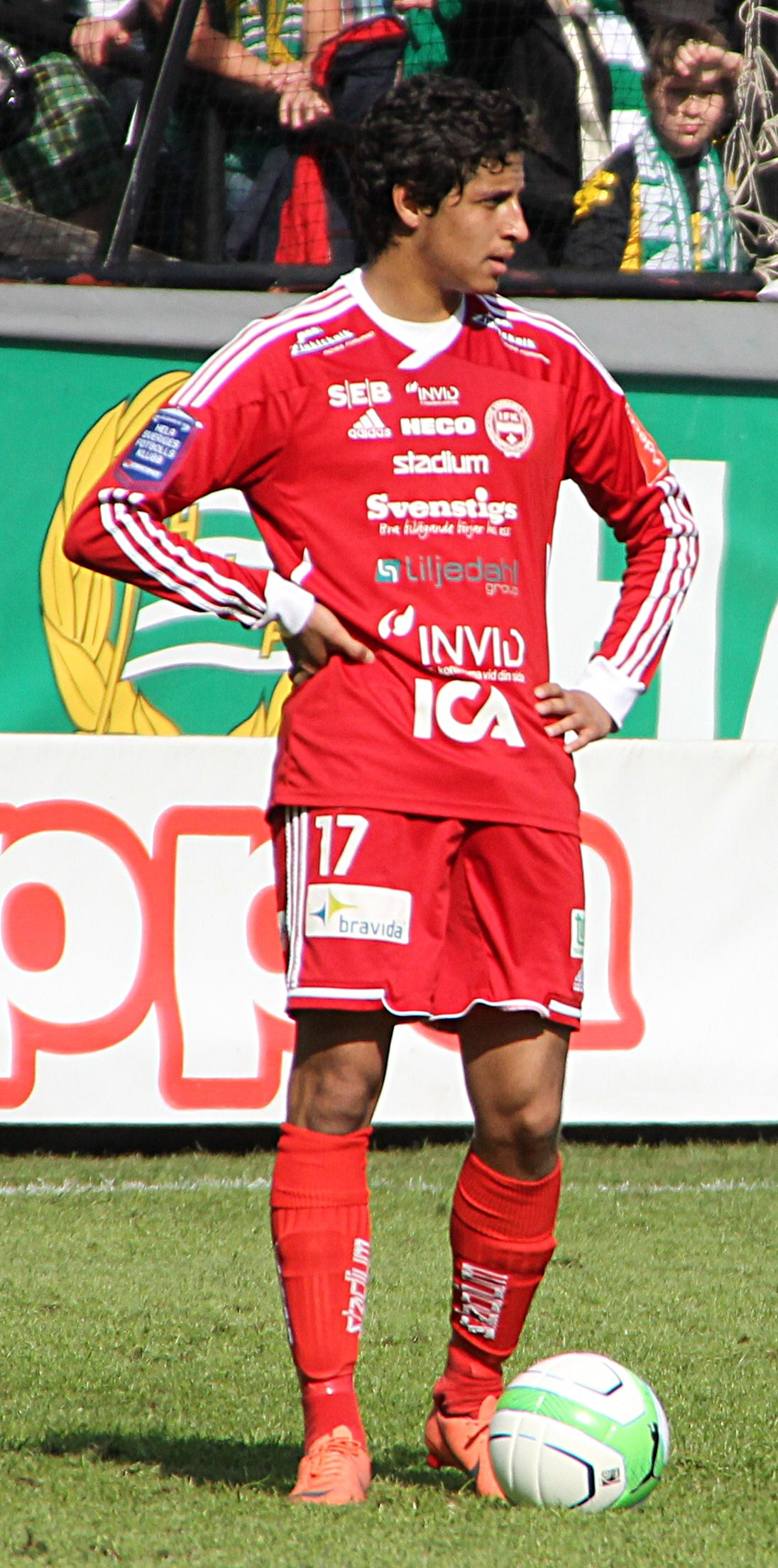 IFK Värnamos Ahmed Awad.